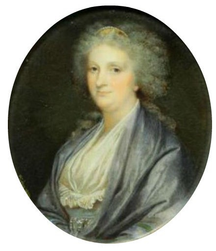 Анна Юлиана Бенкендорф, ур. баронесса Шиллинг фон Канштадт (1758 — 1797)